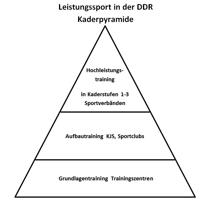 kaderpyramide des ddr Sports